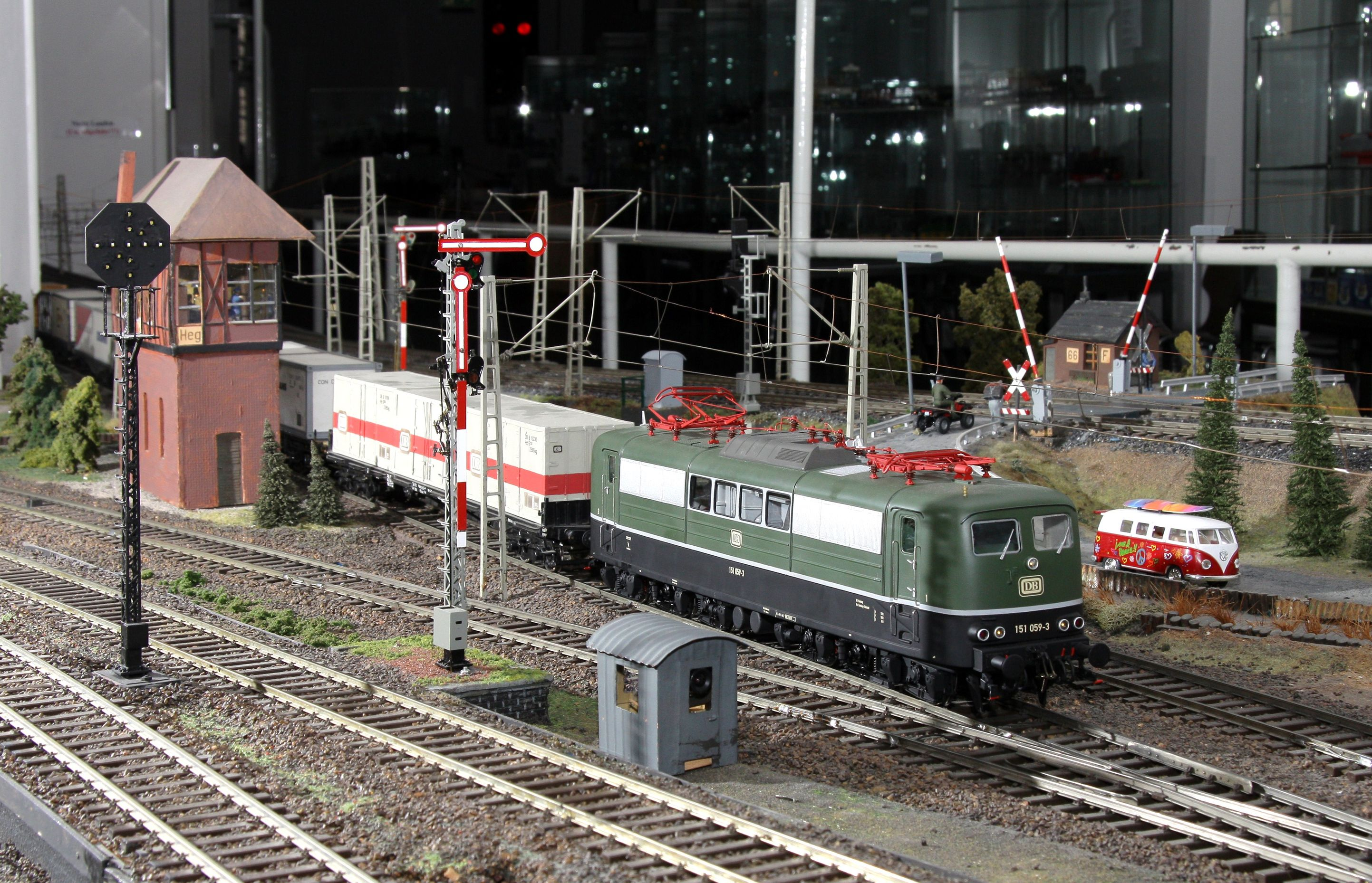 Modelleisenbahn im Museum für Hamburgische Geschichte - Bahnübergang Seevetal